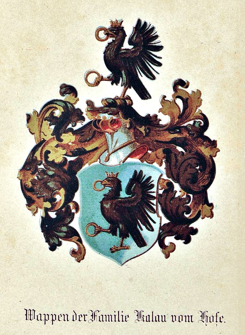 Wappen der deutschen Adelsfamilie "Kalau vom Hofe"